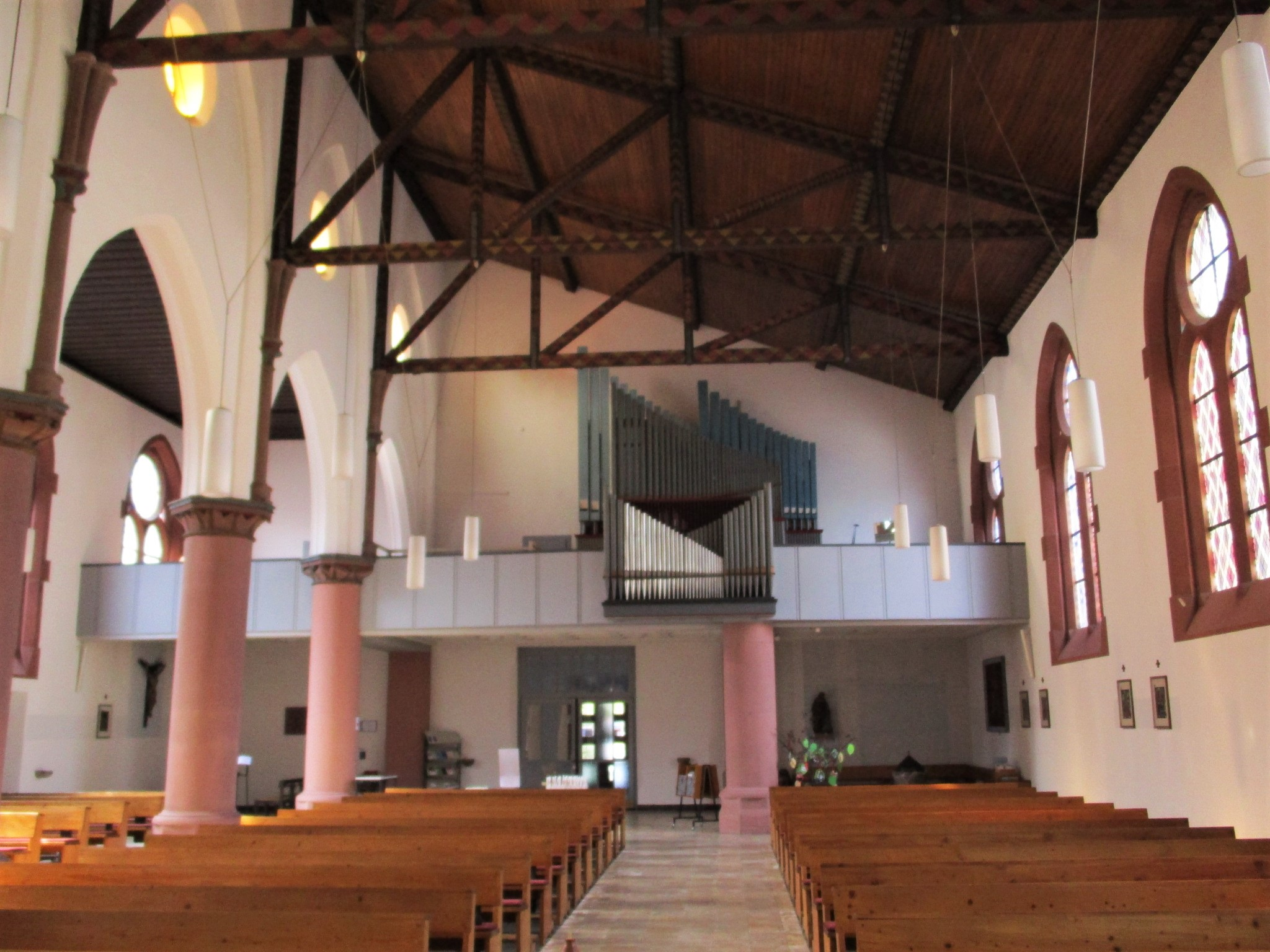 Innenansicht mit Blick zur Orgel und Haupteingang, Kirche St. Elisabeth, Frankfurt-Bockenheim